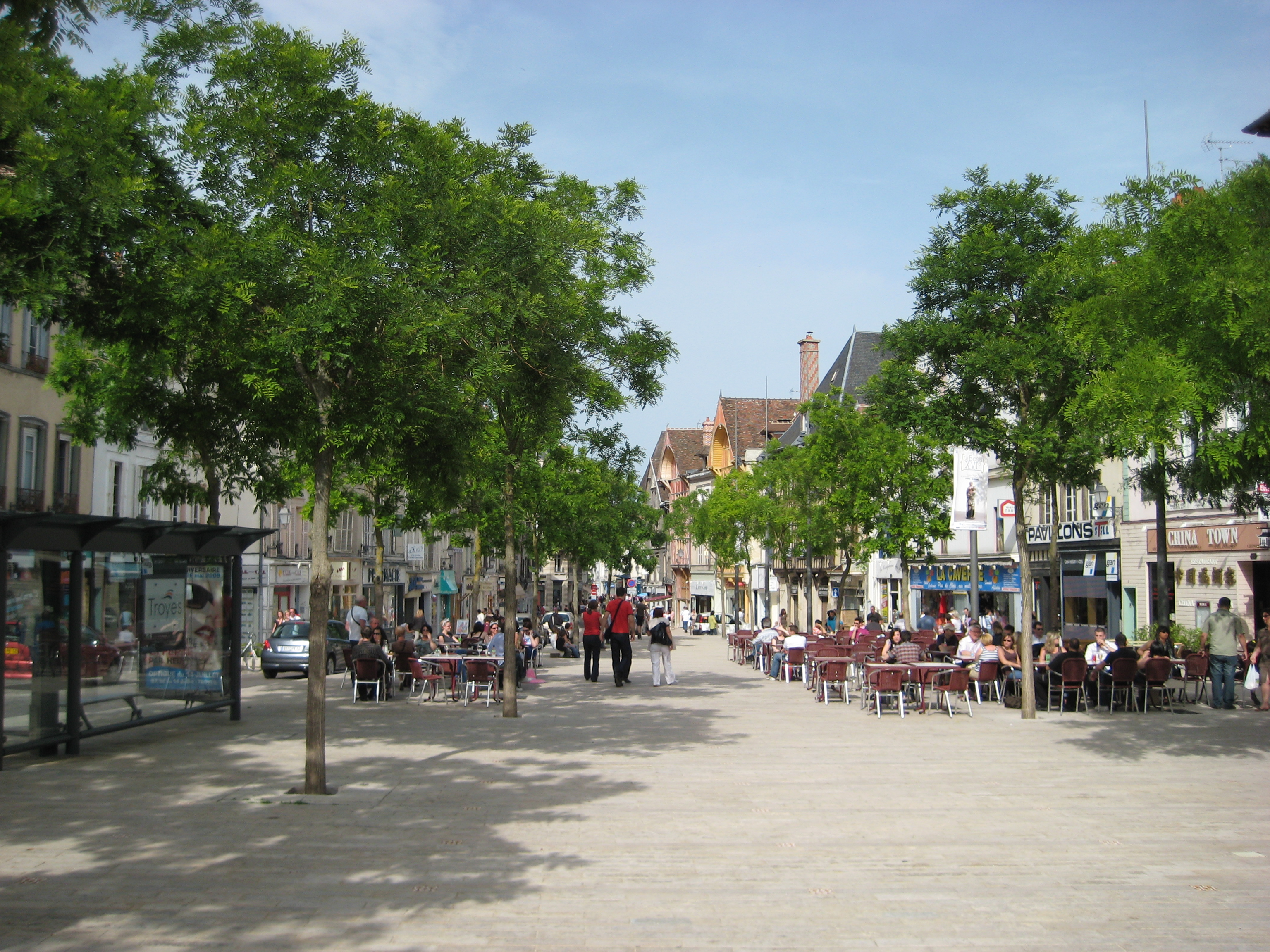 Place de la bourse, Troyes, Champagne, France